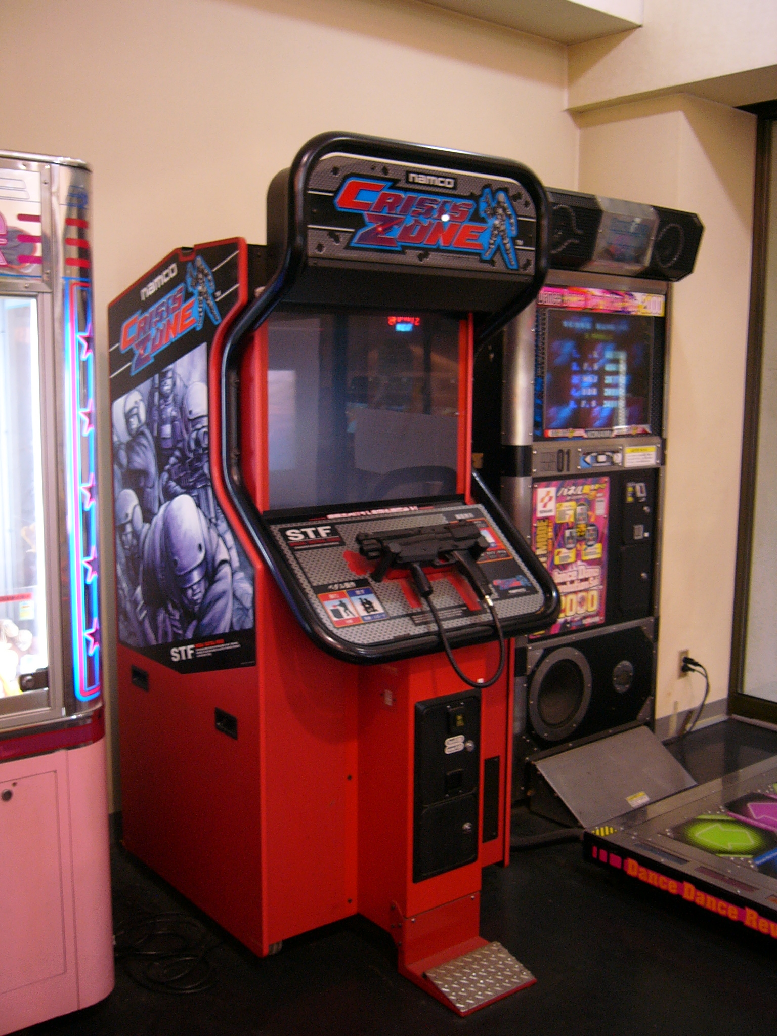 クライシスゾーン筐体